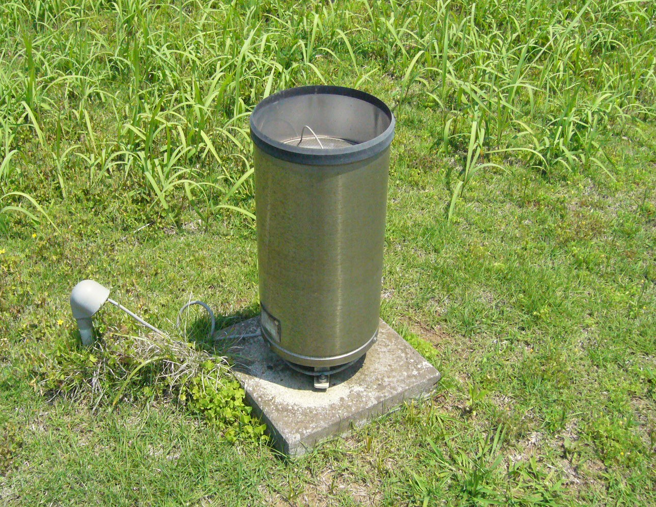 rain-gauge,amedas-katori-chiba,japan